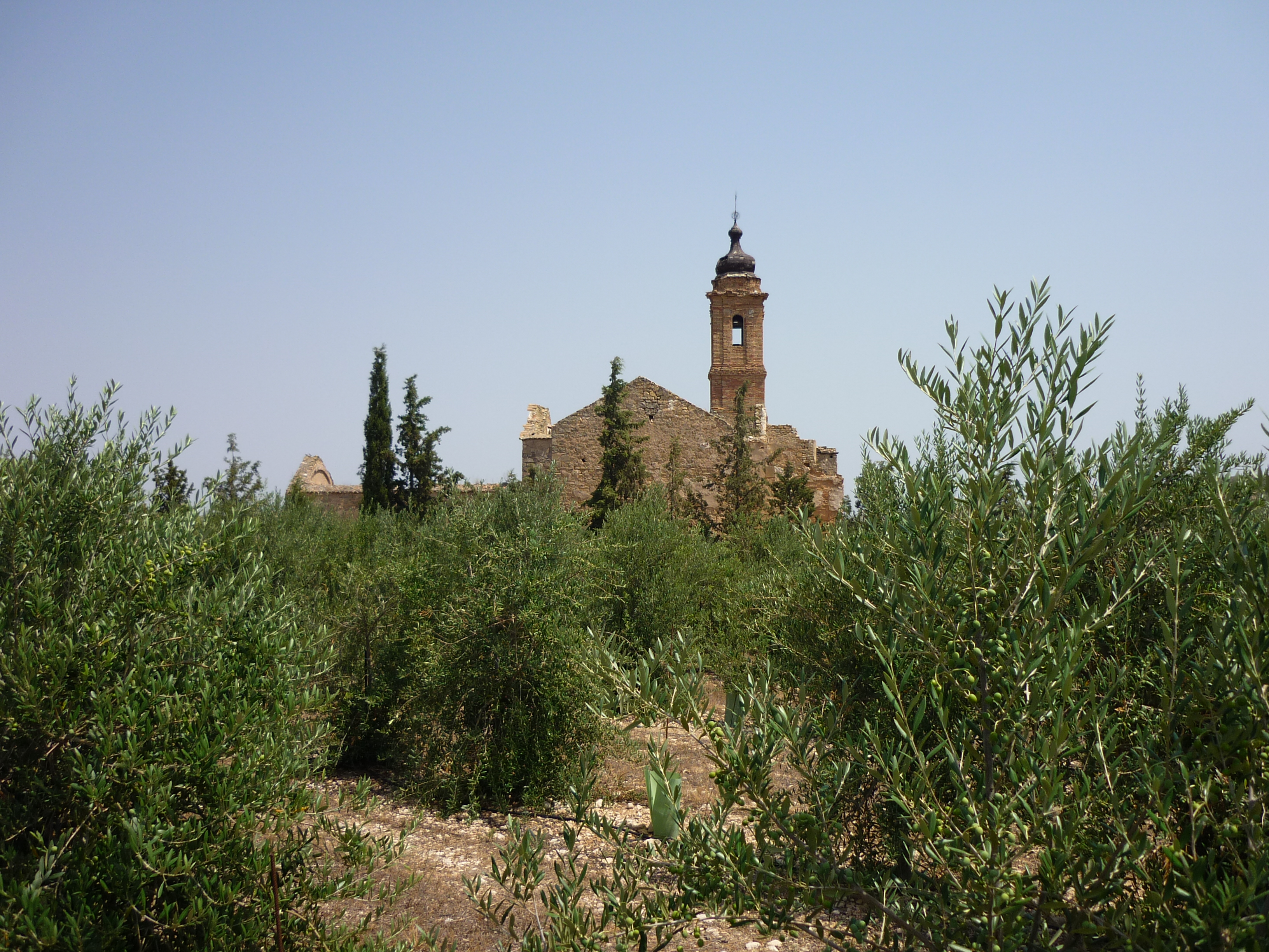 Trapa von Santa Susana, Ansicht von Osten